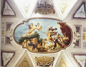 Biblioteca roncioniana, affresco di luigi catani